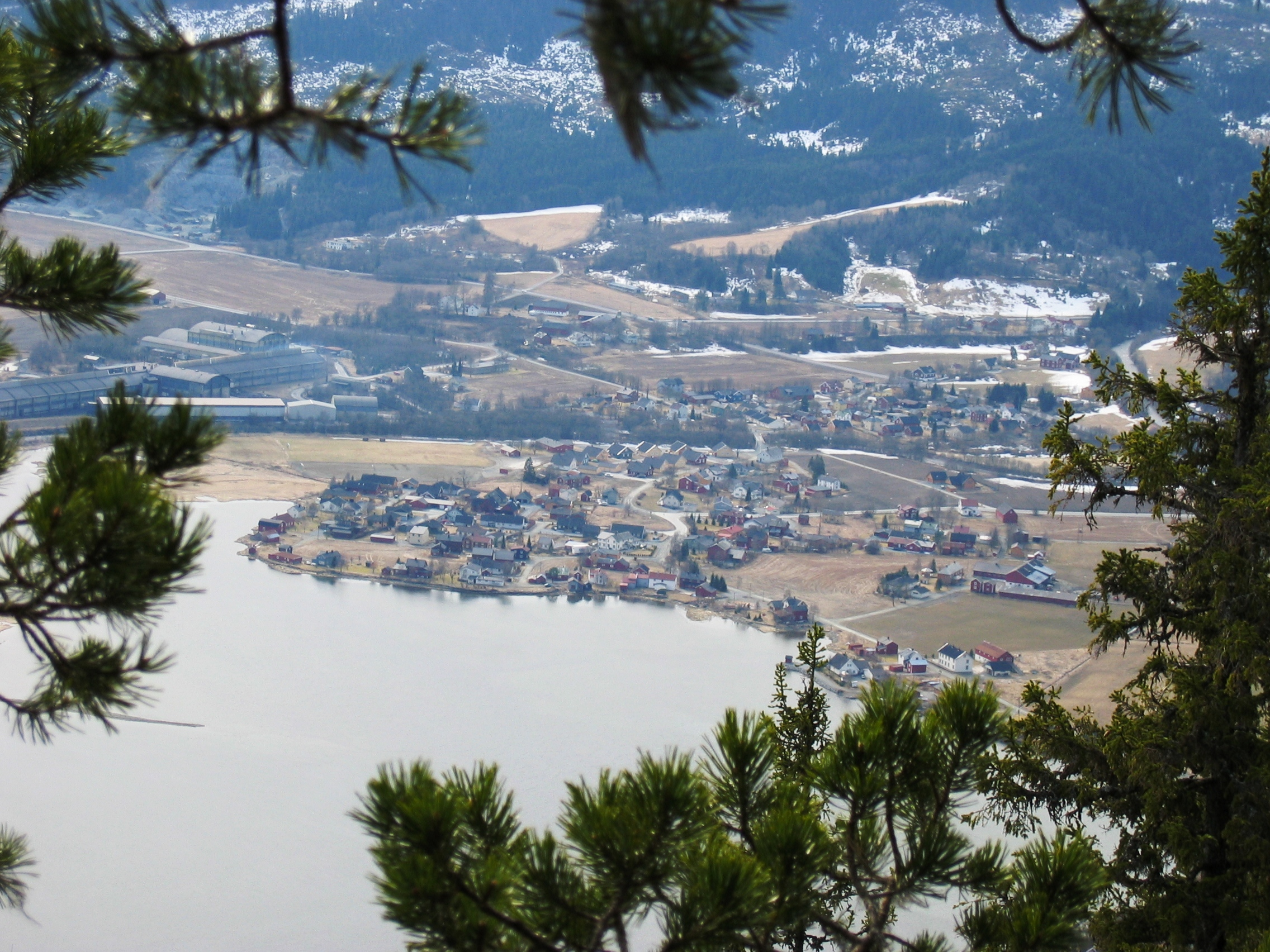 Gjølme